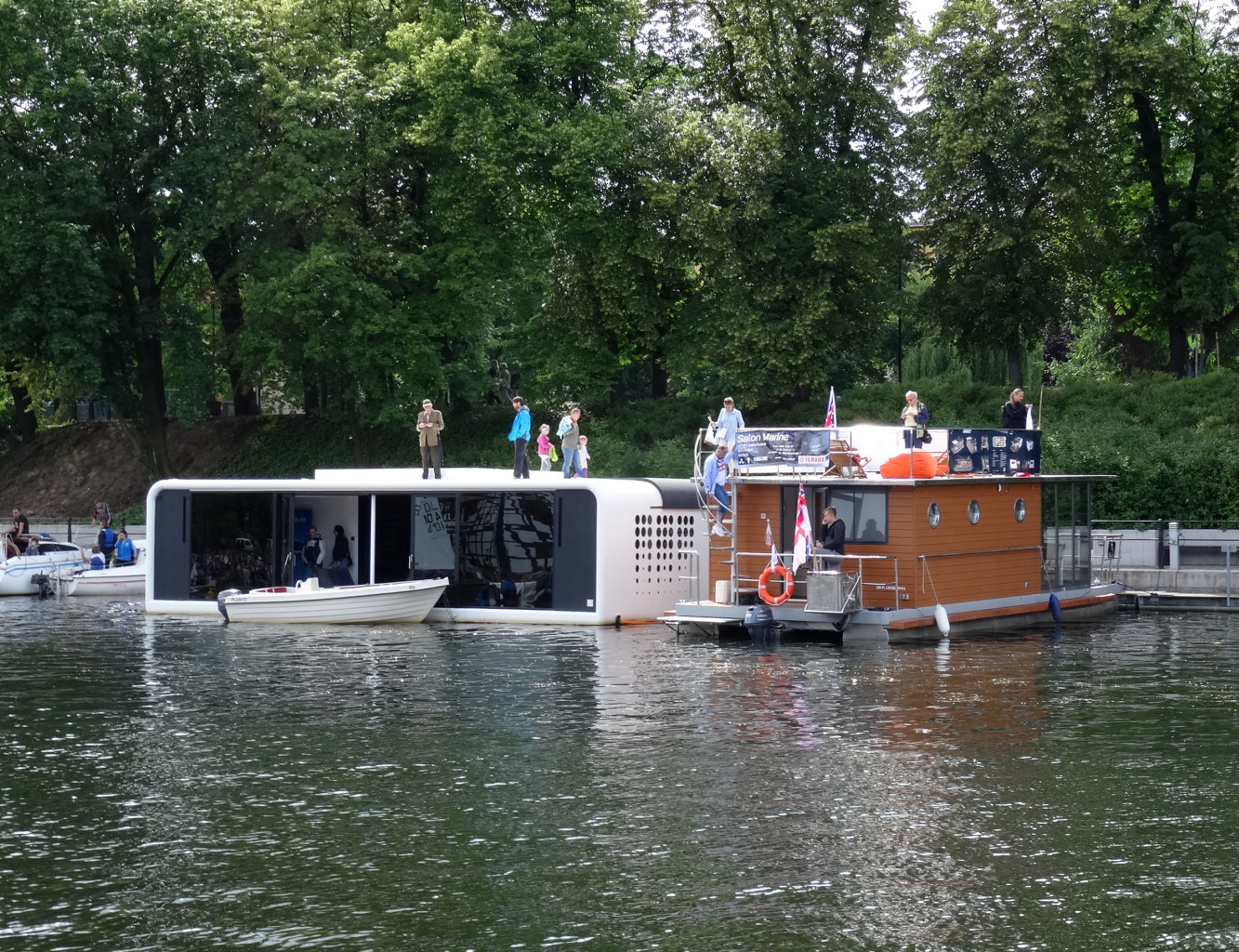 Bydgoski Festiwal Wodny Ster na Bydgoszcz 2015. Jachty mieszkalne oraz domy na wodzie.